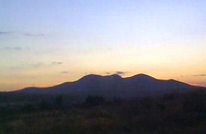 Fotografía del cerro de los gallos en Aguascalientes